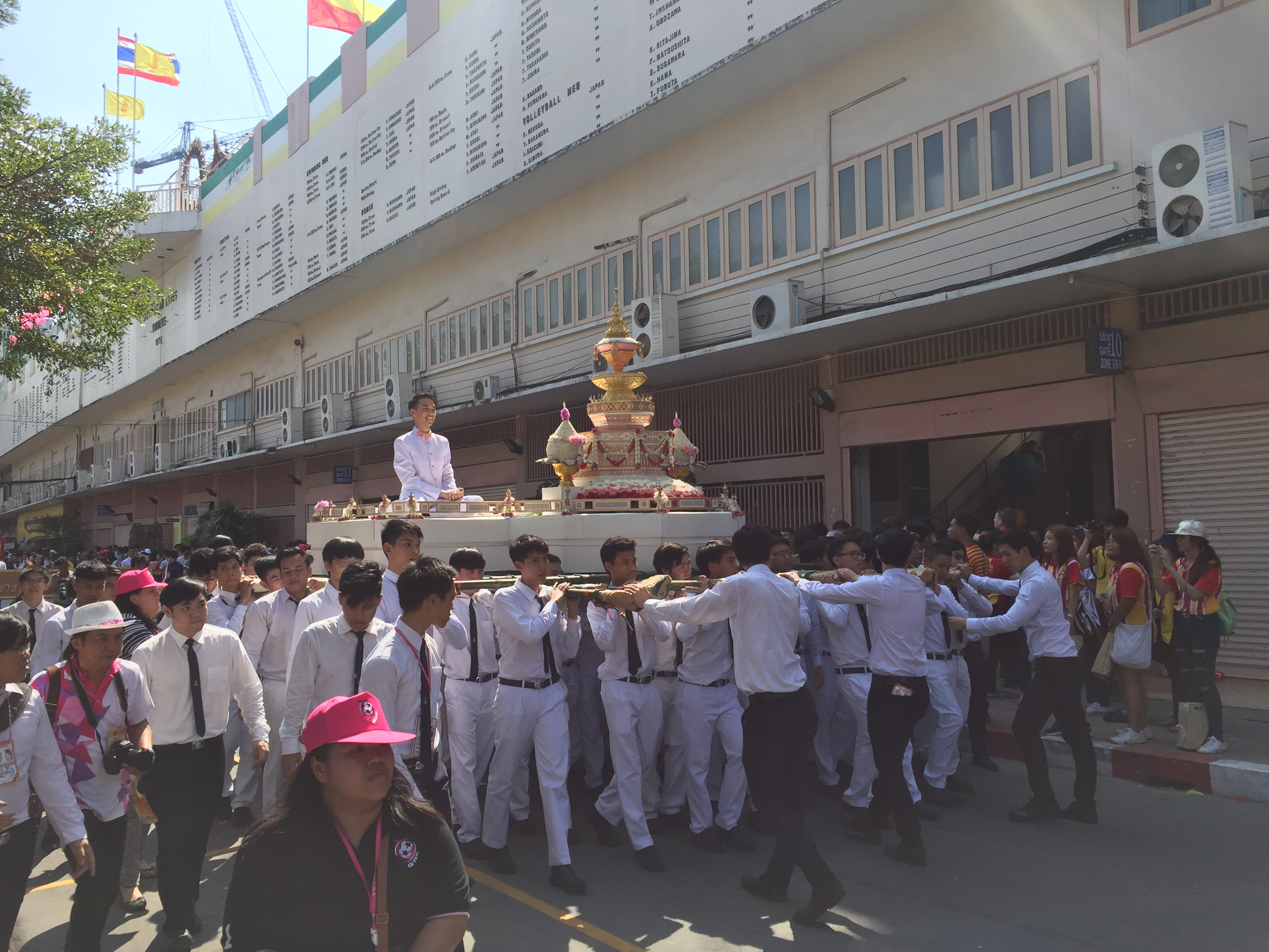 ขบวนอัญเชิญพระเกี้ยวกำลังเคลื่อนเข้าสู่สนามศุภชลาศัย ในงานฟุตบอลประเพณีธรรมศาสตร์-จุฬาฯ ครั้งที่ 71